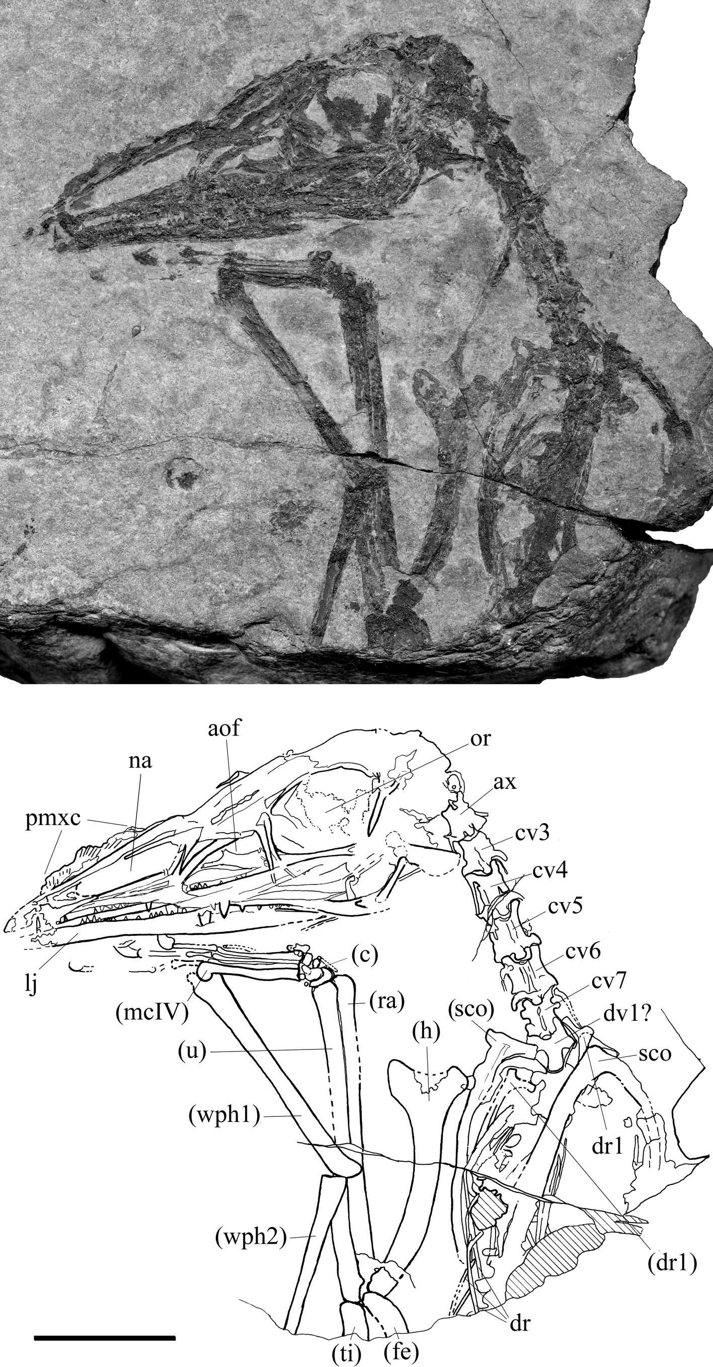 Austriadactylus cristatus from Carnic Prealps and illustration of holotype (C).